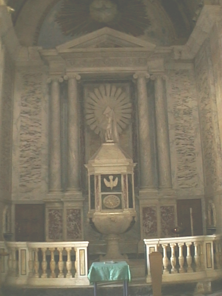 Battistero (XIX secolo), Cattedrale di Cagliari